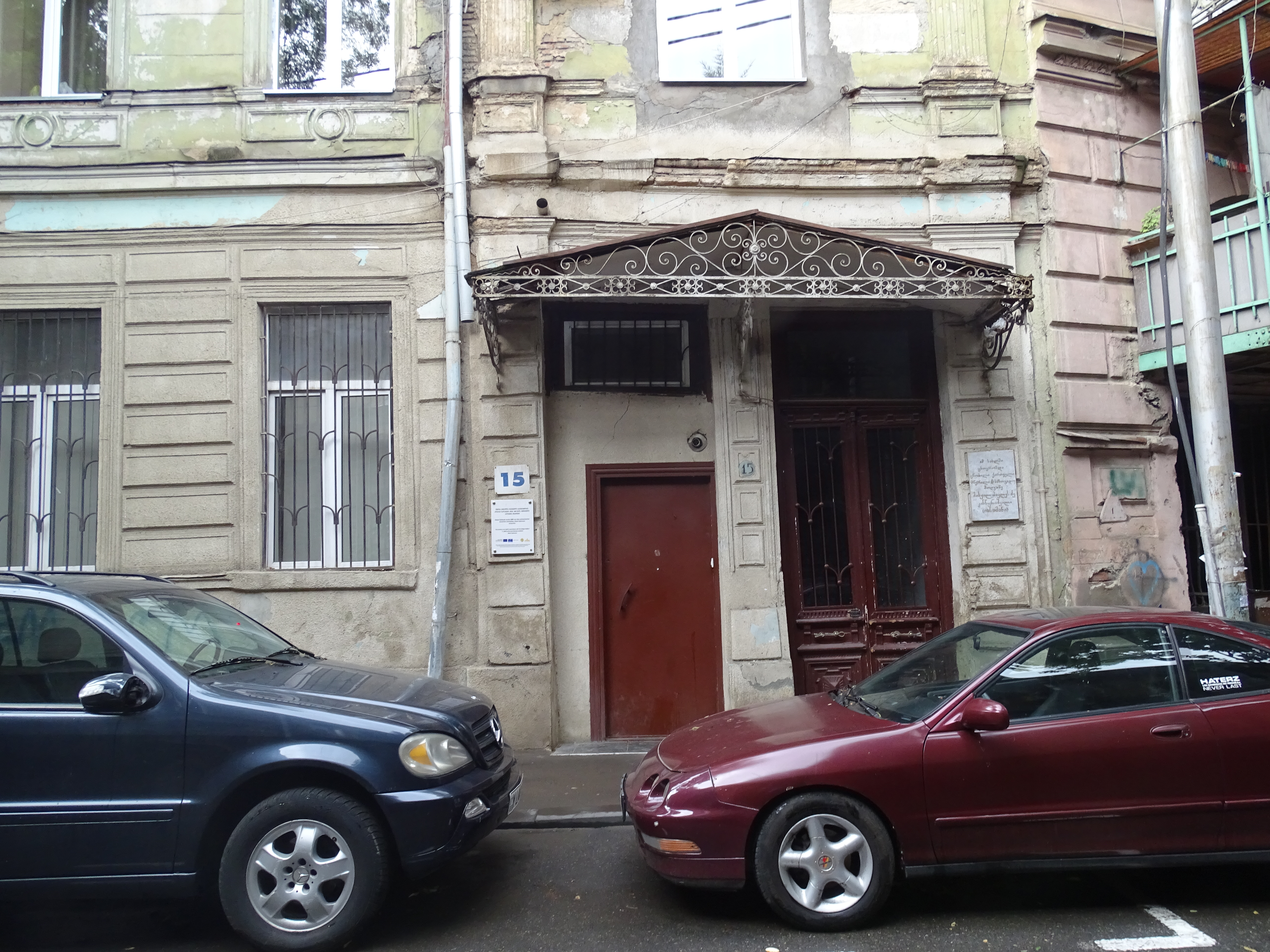 Gebäude in Tiflis gebaut von Architekt Albert Salzmann. Georgische Gedenktafel für Kintsuraschwili (Pseudonym Jasamani) Michail Pavlovich (1885-1955), Schriftsteller, Übersetzer.